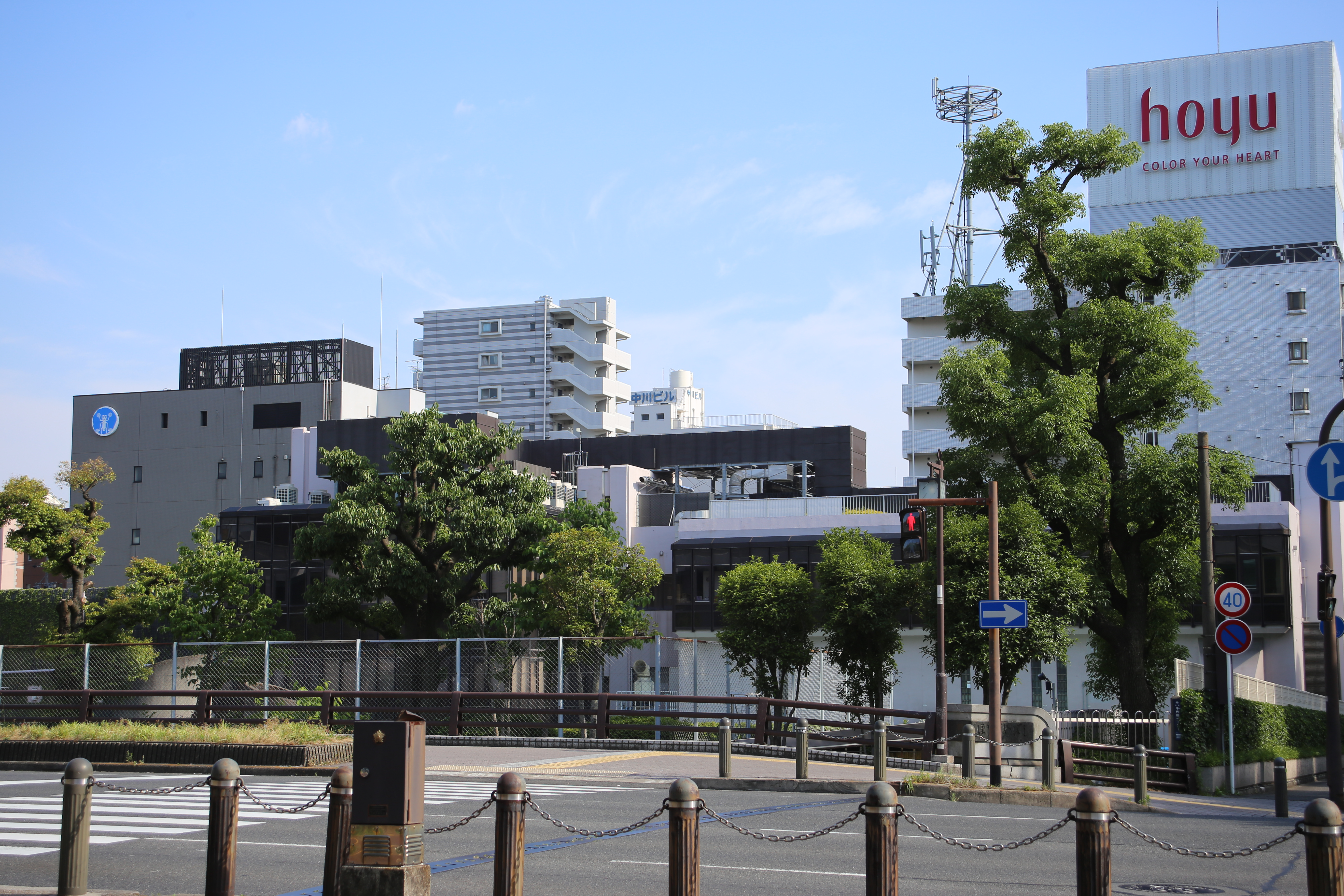 名古屋市中区千代田一丁目の名古屋市上下水道局堀留水処理センターを北側公道西側より撮影